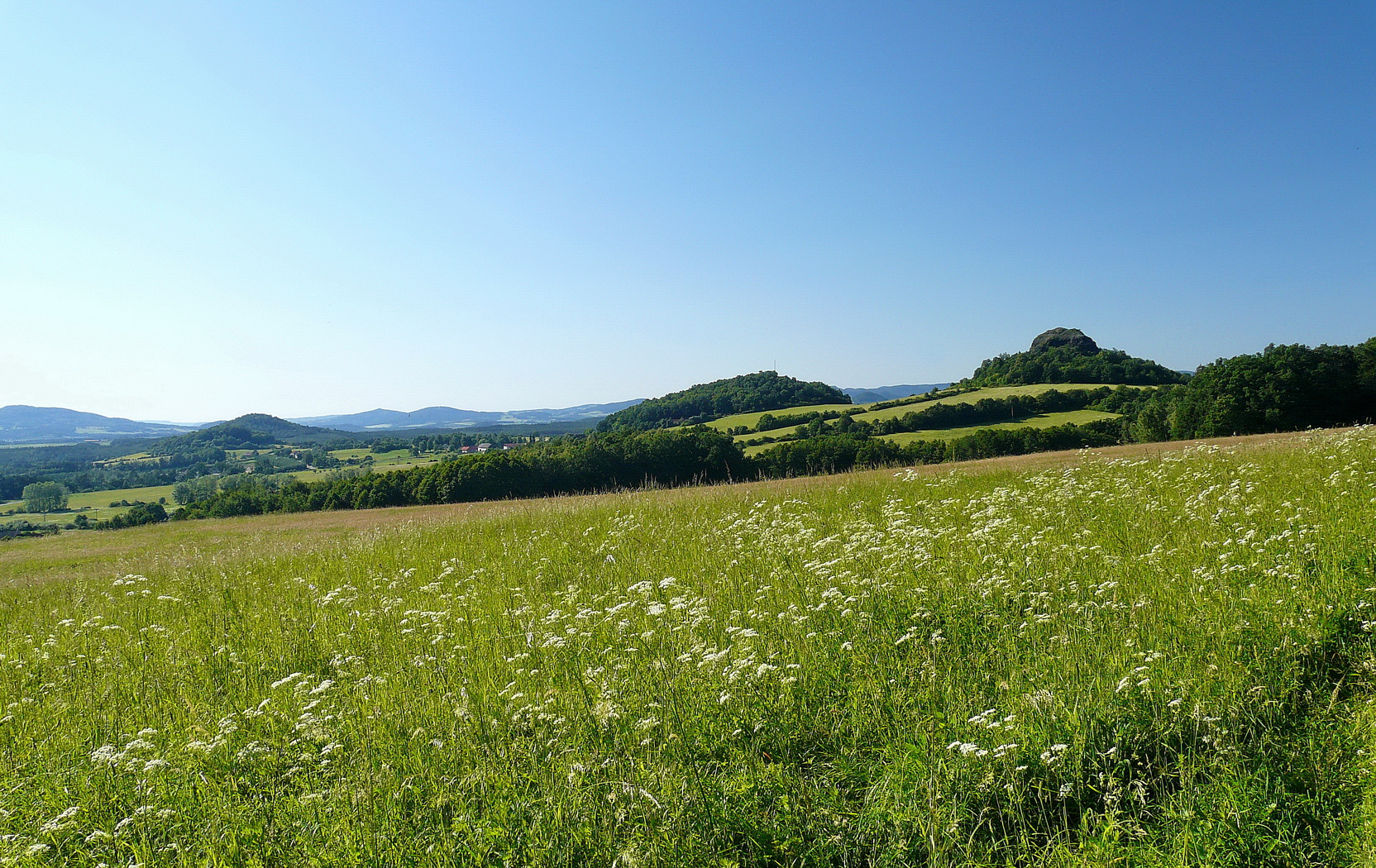 Provodínské kameny z úpatí Dlouhého vrchu – zleva Kraví hora, Puchavec, Michlův vrch, Lysá skála, část Štrausova vrchu.